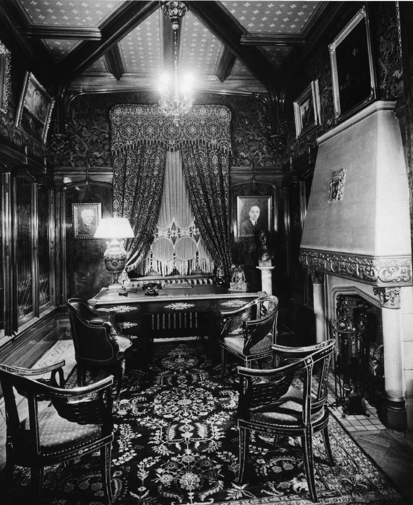 Bibliothèque ou cabinet de travail, maison Marius-Dufresne (Château Dufresne), 4040 rue Sherbrooke Est, Montréal, Québec, Canada.